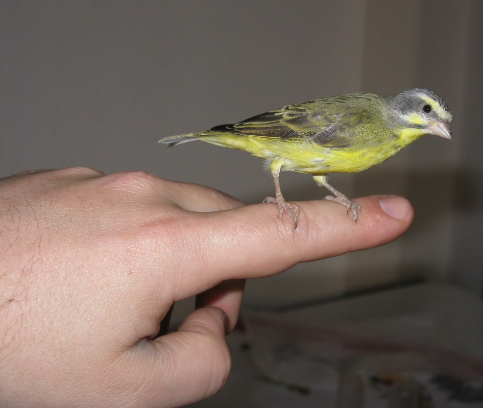 Kézszelíd mozambiki csicsörke tojó